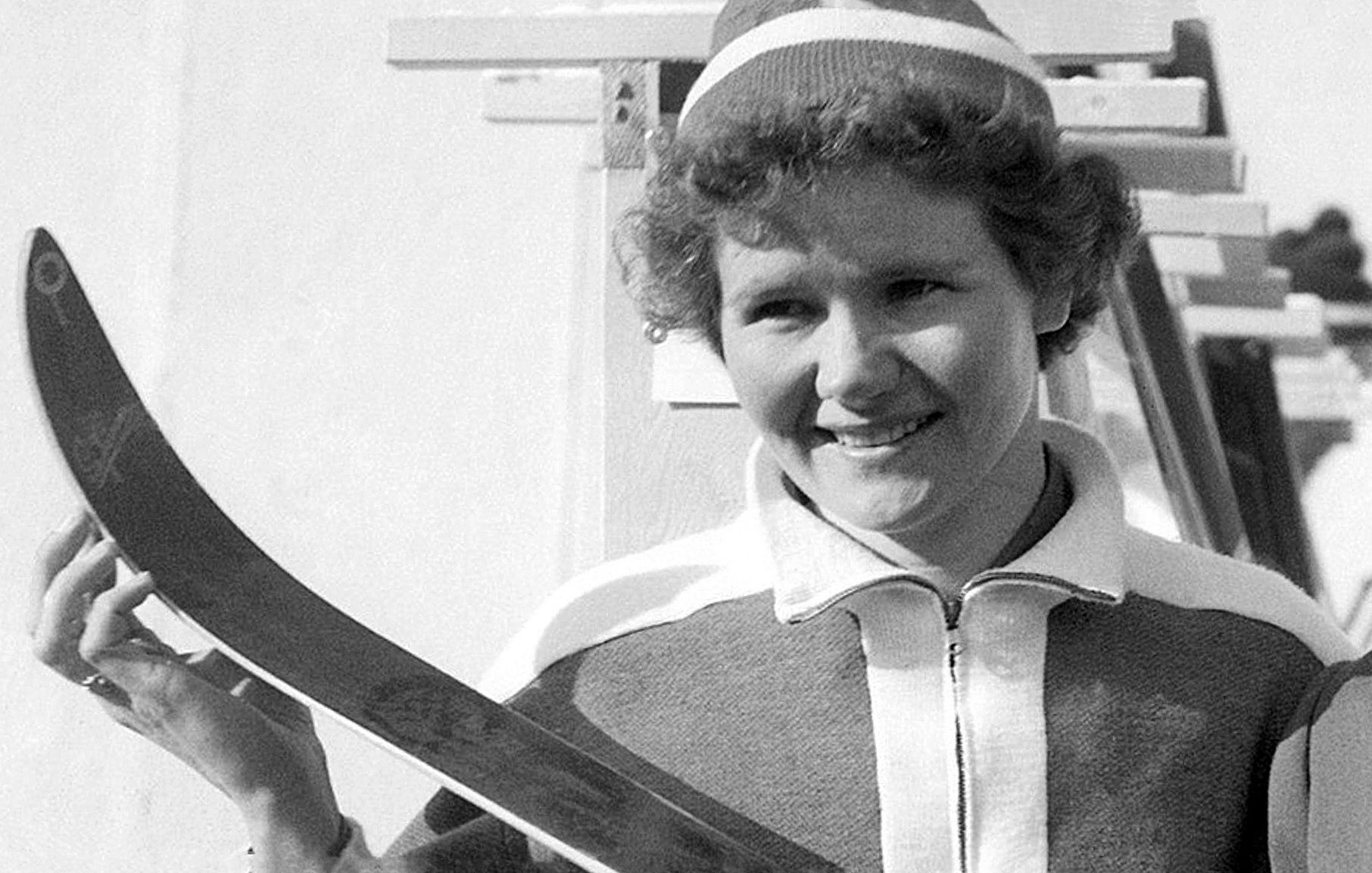 Mirja Hietamies